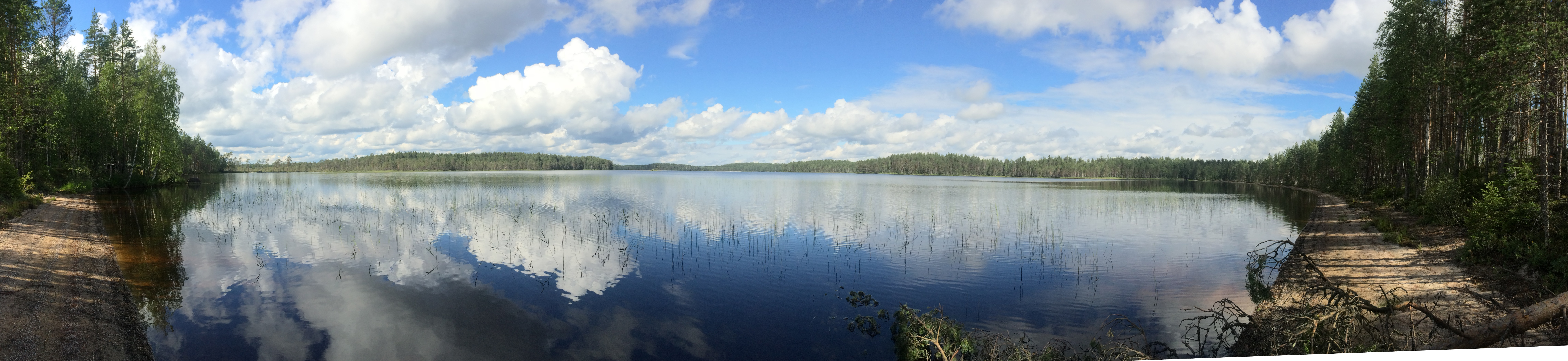 Палват